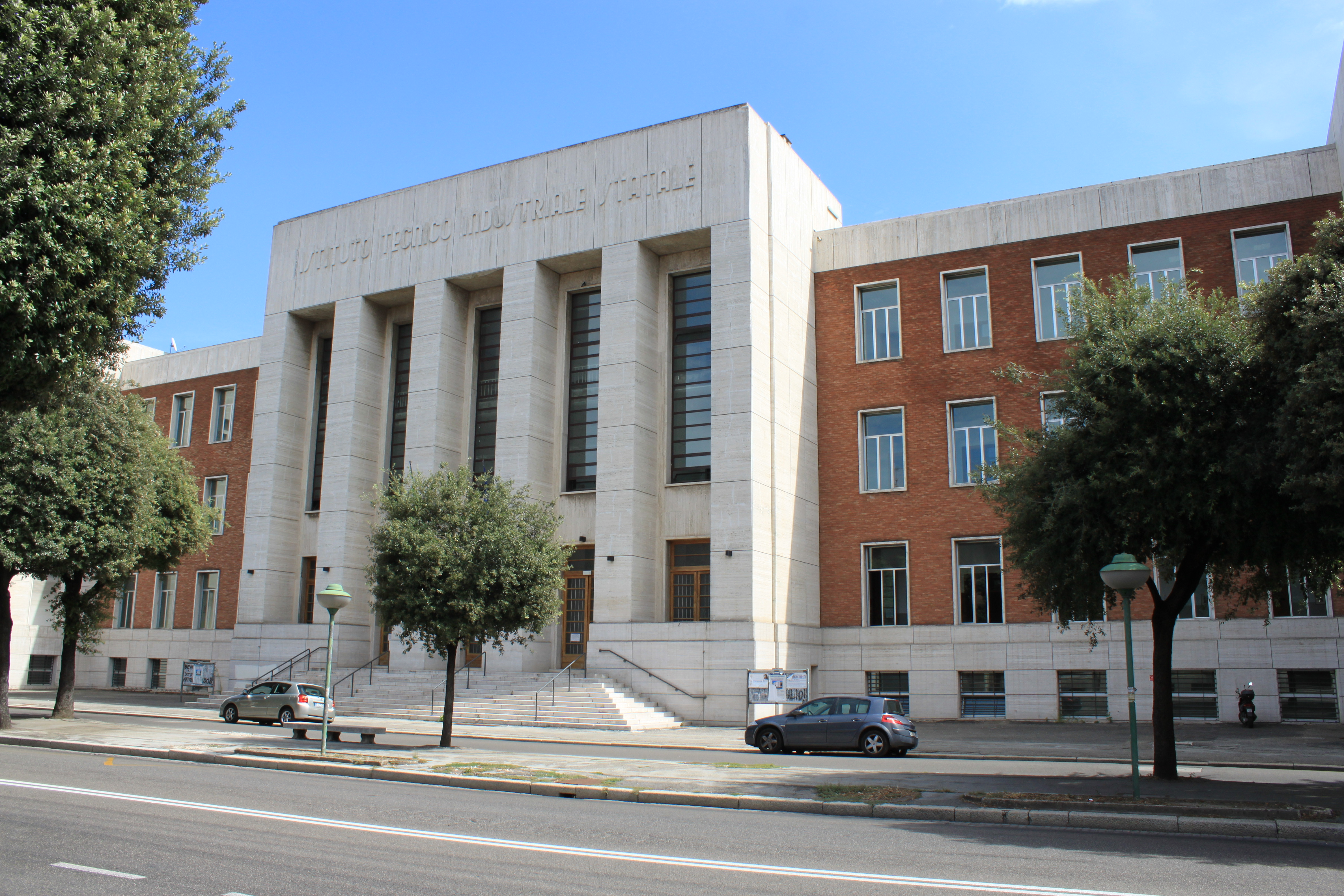 Sede dell'Istituto Tecnico Industriale G. Marconi a Forlì (Italia) in viale della Libertà 13